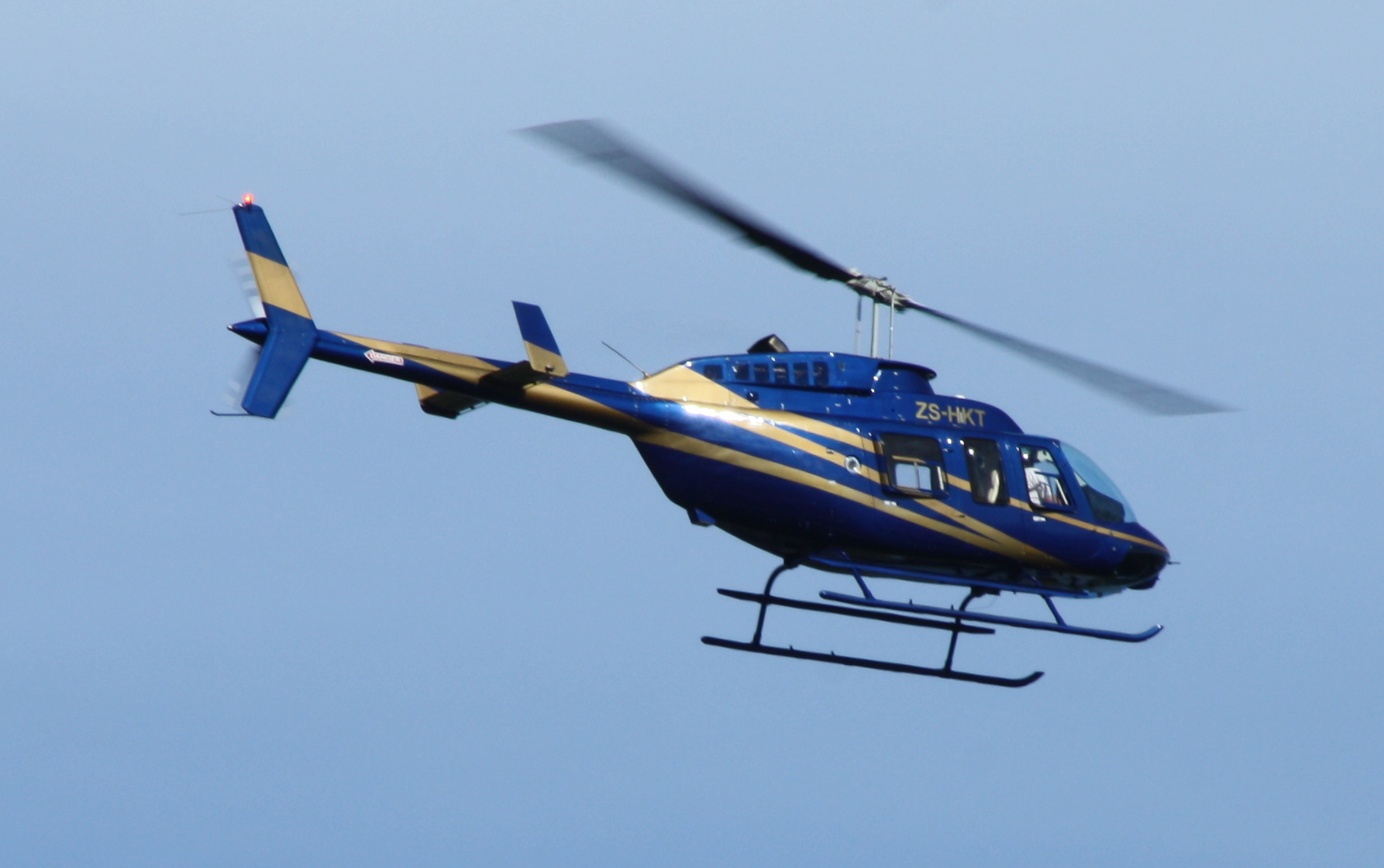 Bell 206L-3 ZS-HKT